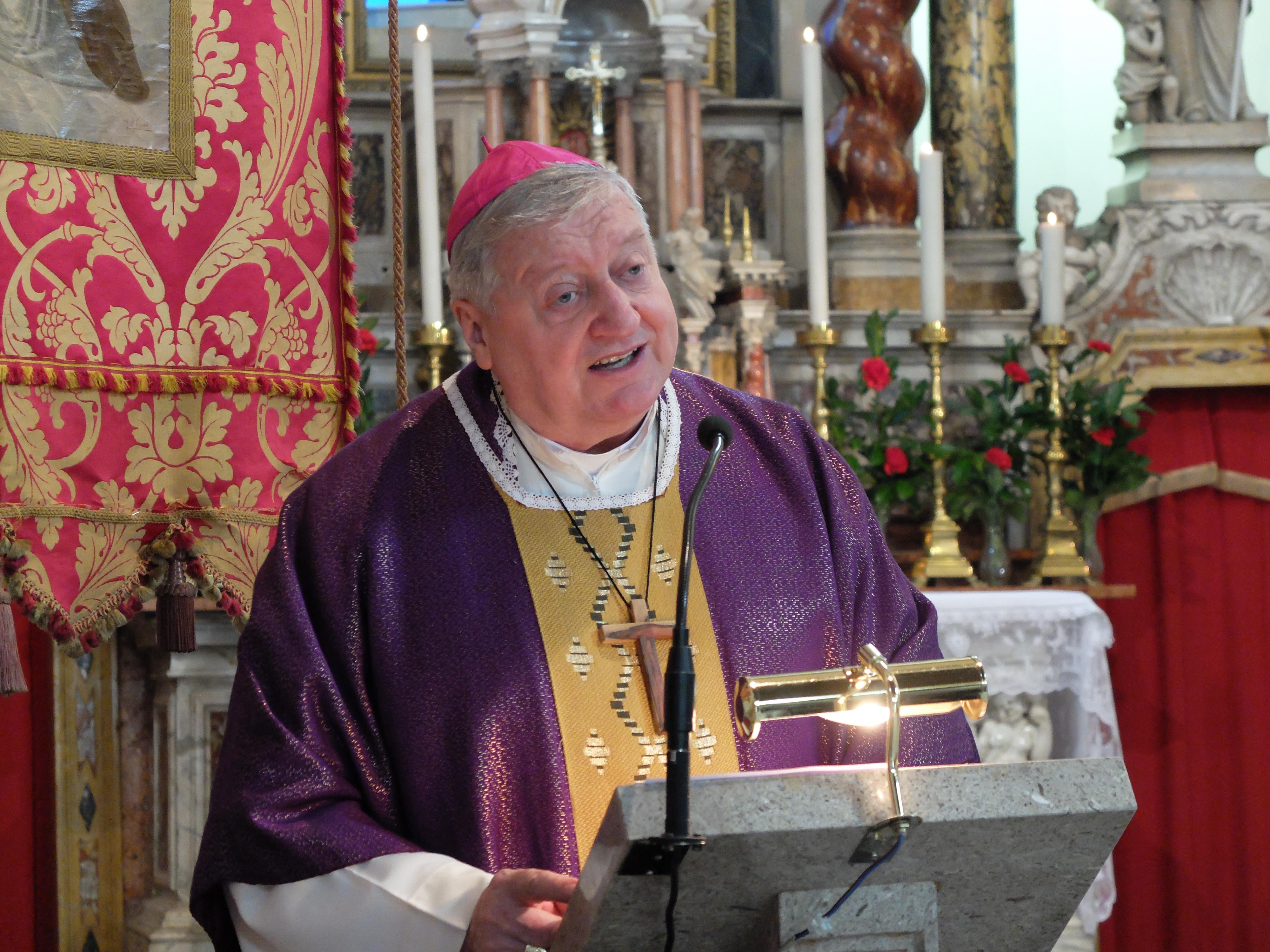 Alojz Uran nella chiesa della Pieve di Dolina 2013